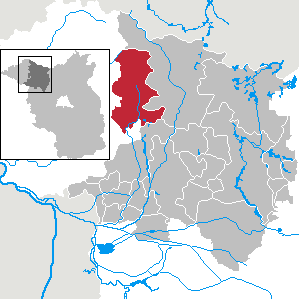 Heiligengrabe in Brandenburg (Country) - District Ostprignitz-Ruppin